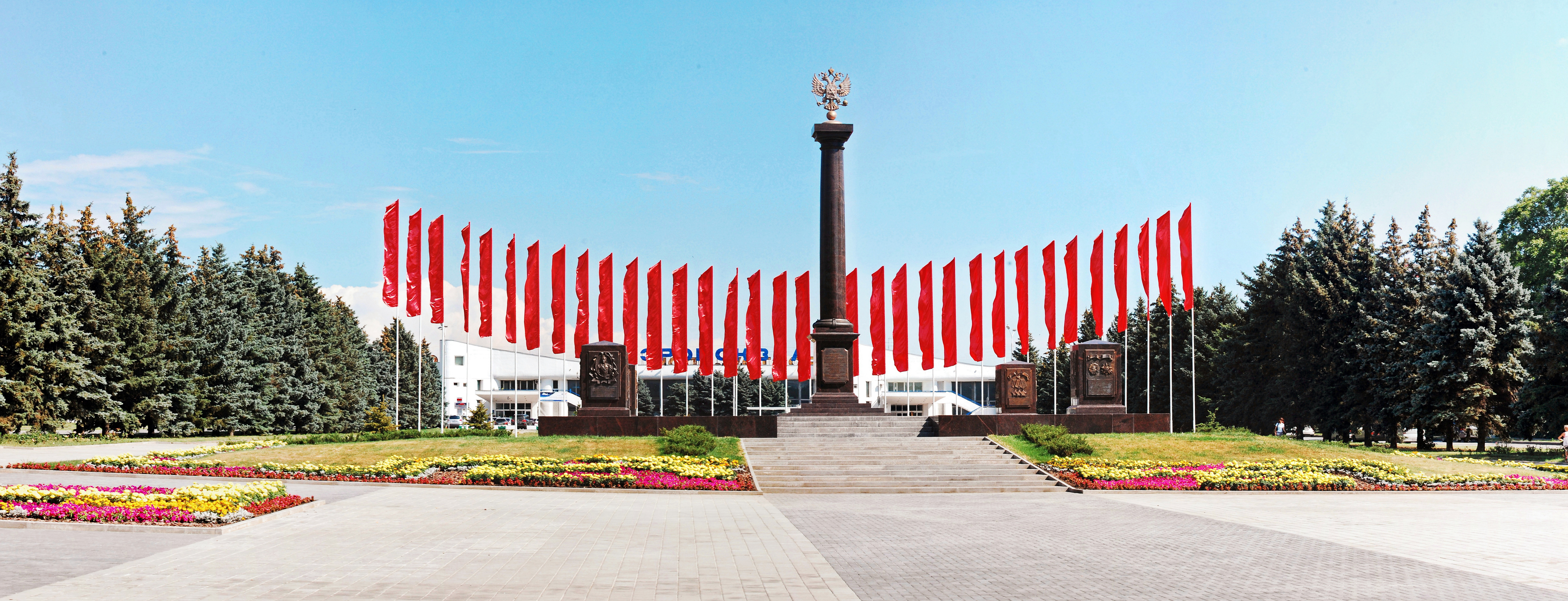 Стела Город воинской славы, Ростов-на-Дону автор фото: Серков Дмитирий Борисович